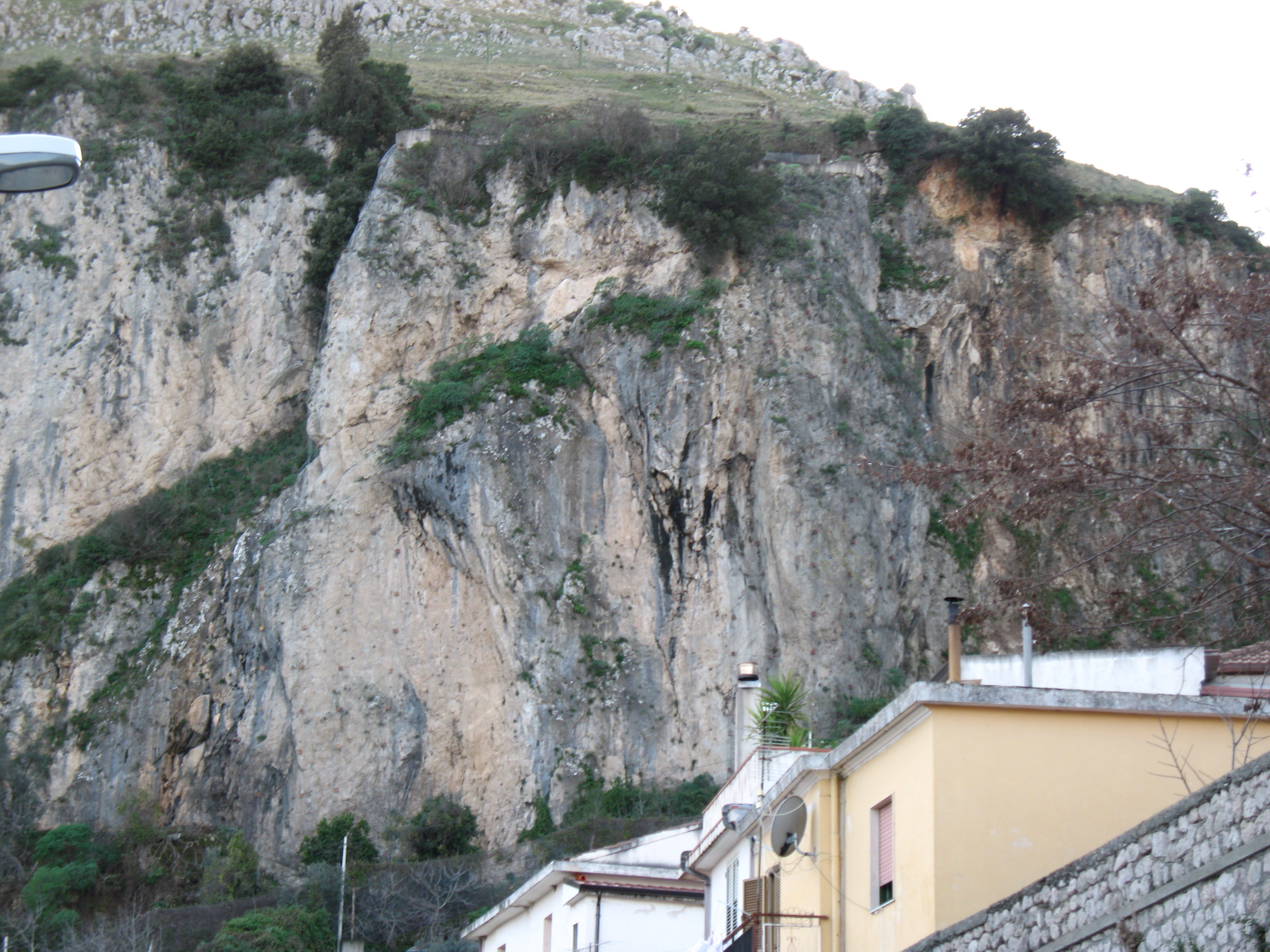 Canolo (RC)